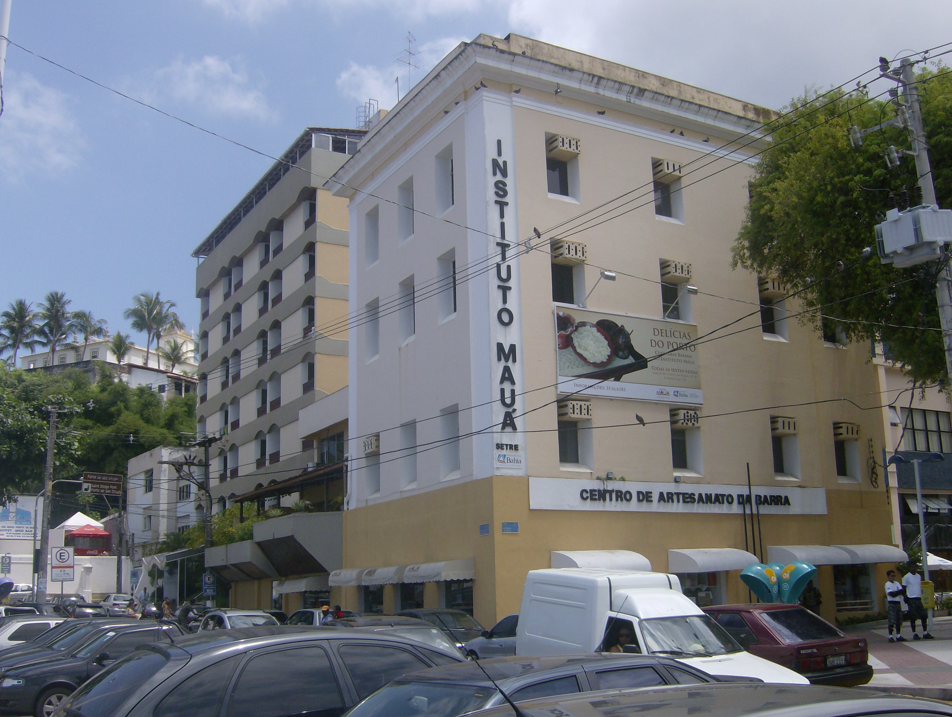 O Instituto Mauá - Centro de Artesanato da Barra, Salvador, Bahia, Brasil.